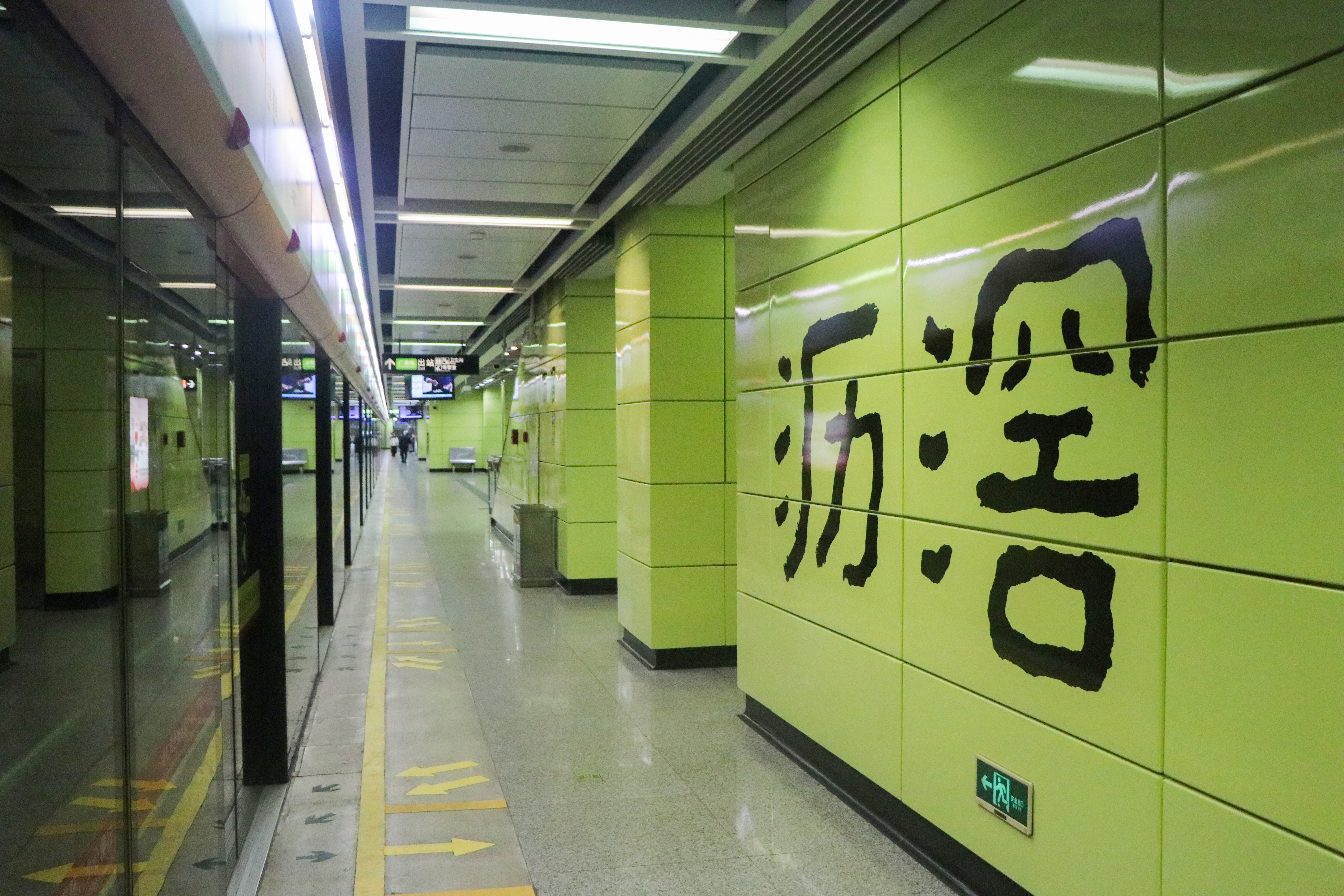 广州地铁沥滘站